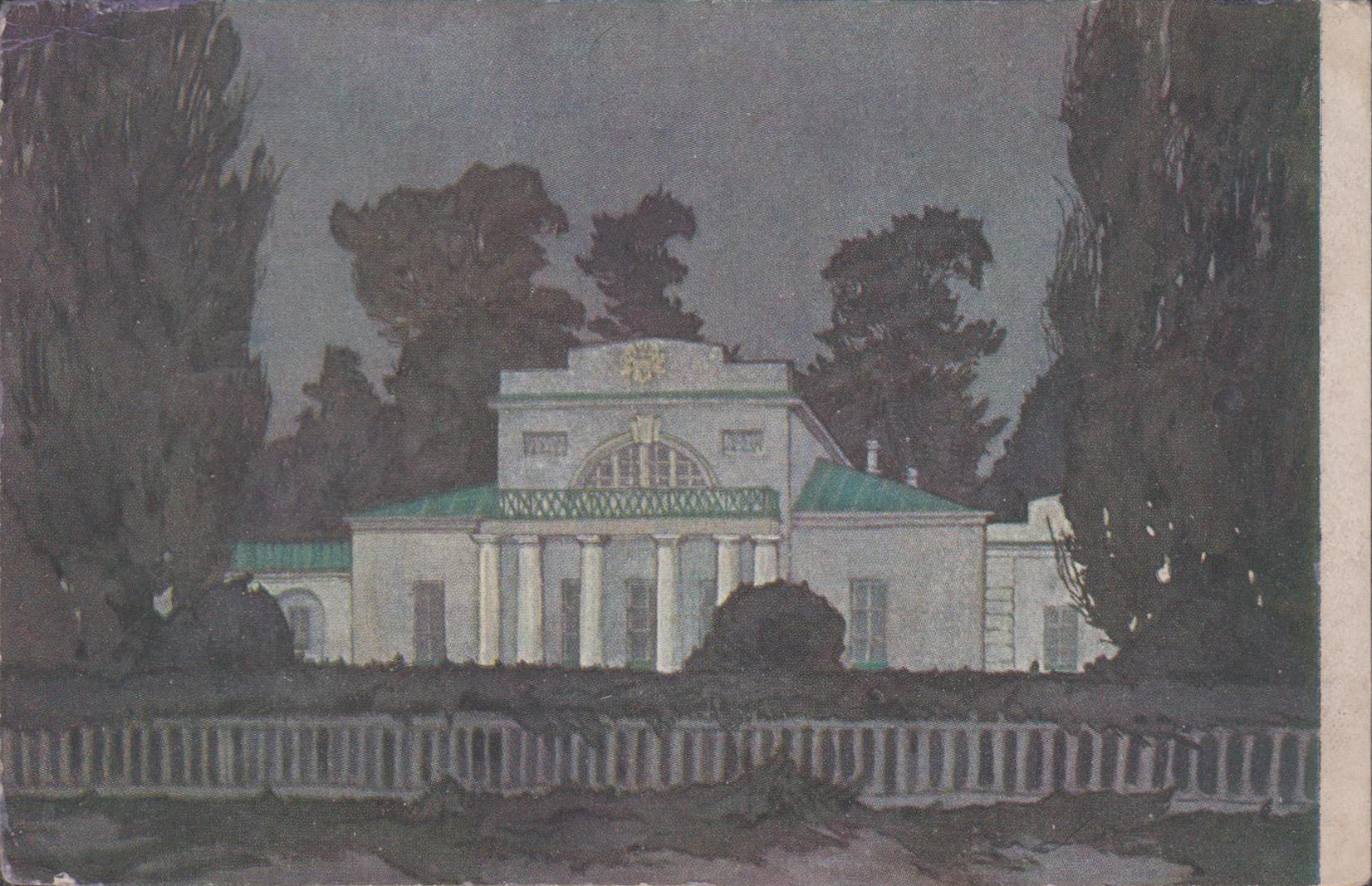 Беларуская (тарашкевіца): Гомель (Homiel), палац Крушэўскіх (Krušeŭski)